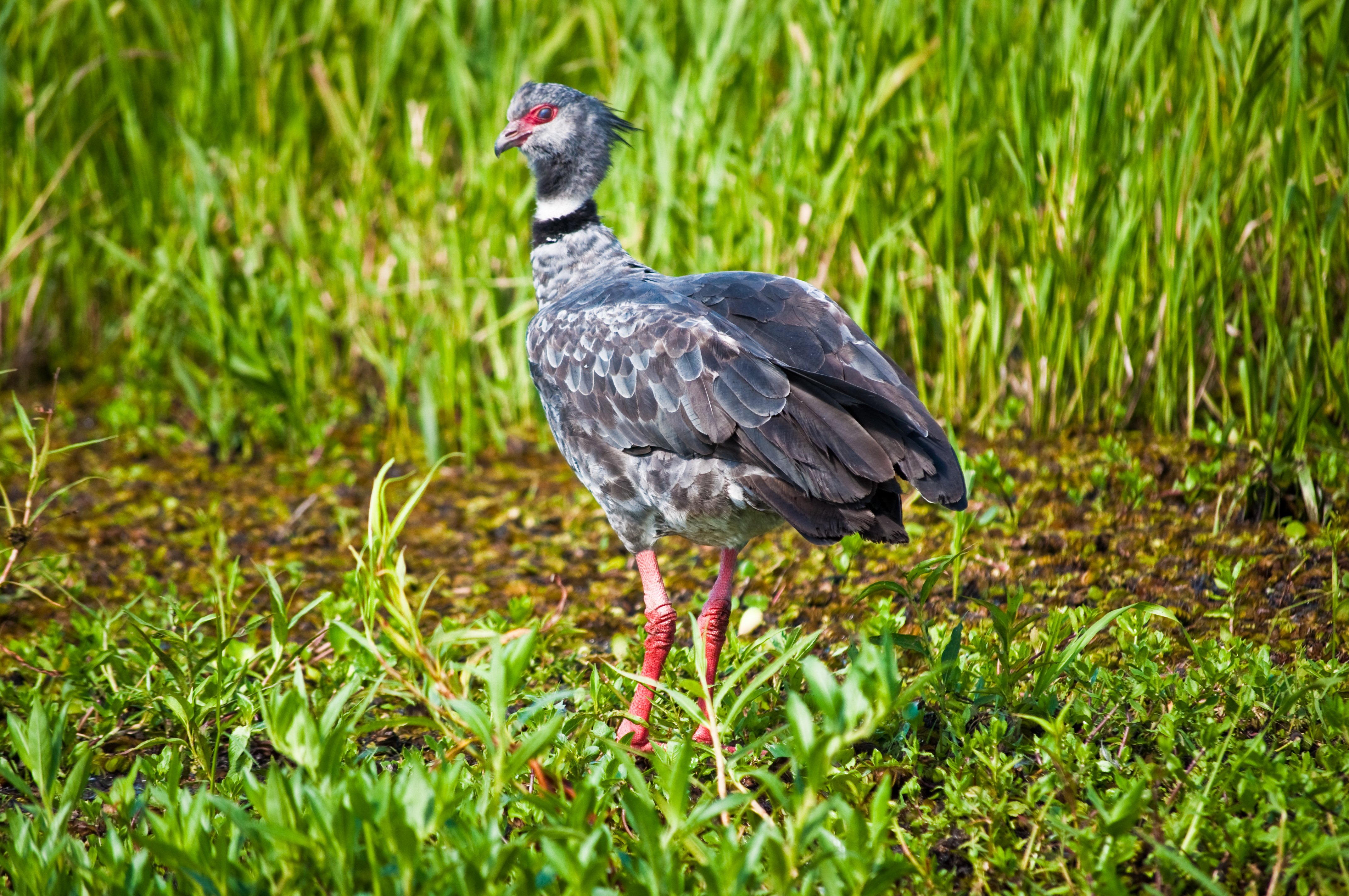 Esteros Del Ibera, Corrientes, Argentina, 3rd. Jan. 2011